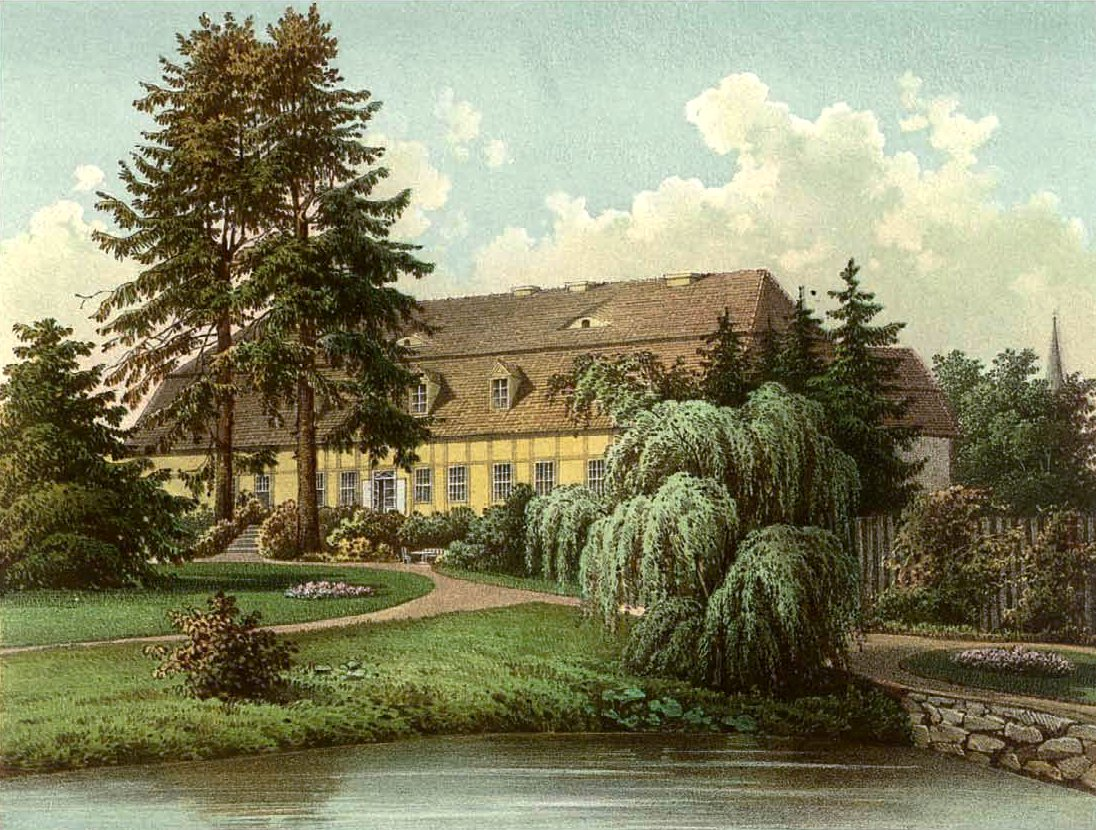 Gut Frehne, Lithographie von Alexander Duncker